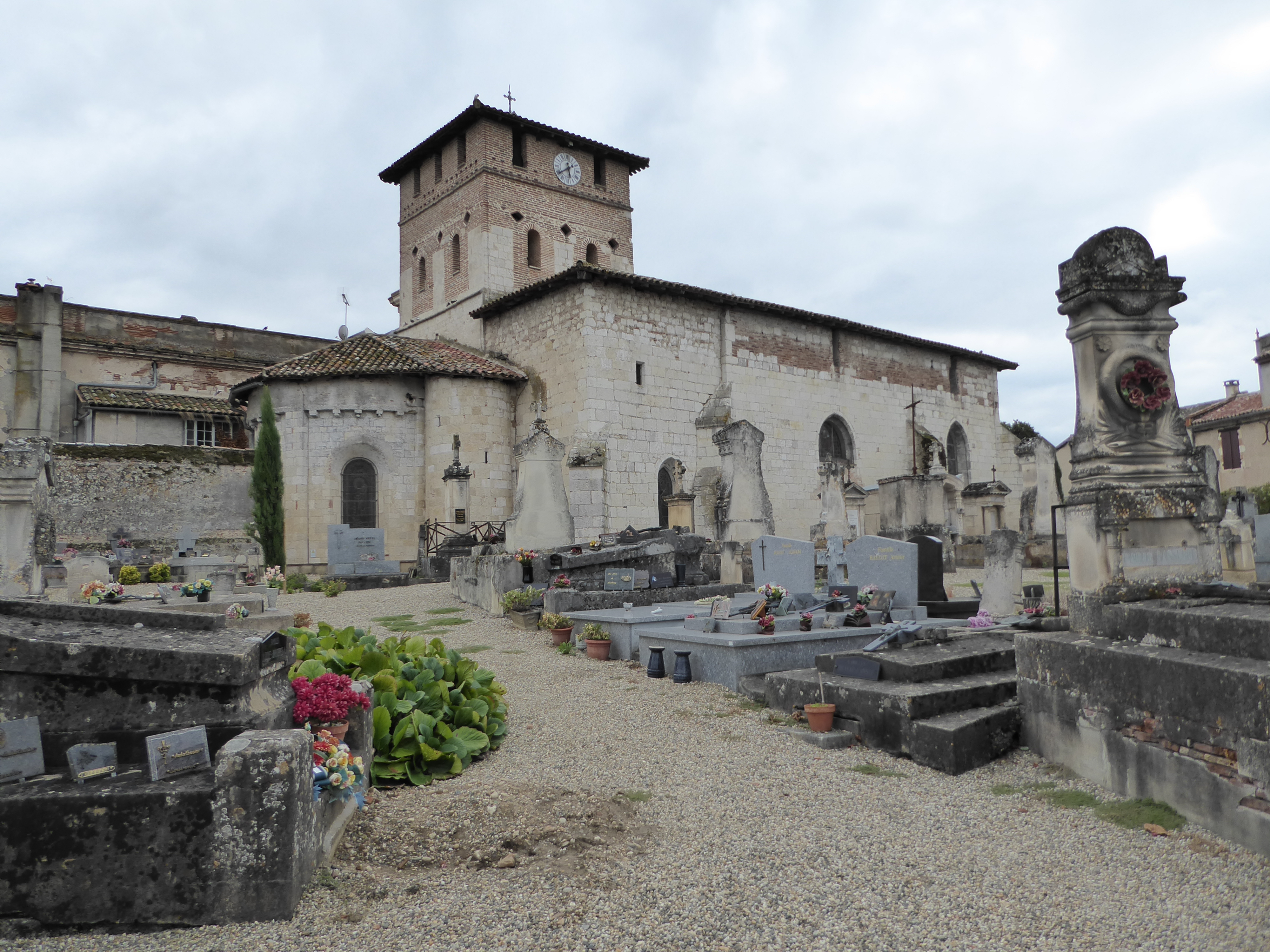 Église Saint-Denis de Pommevic